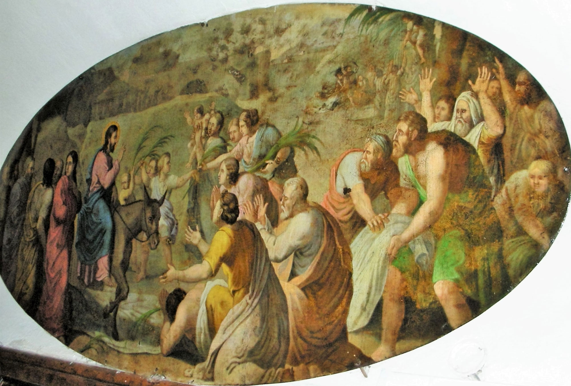 Intrarea în Ierusalim - icoană din Biserica Sfântului Nicolae din Șcheii Brașovului